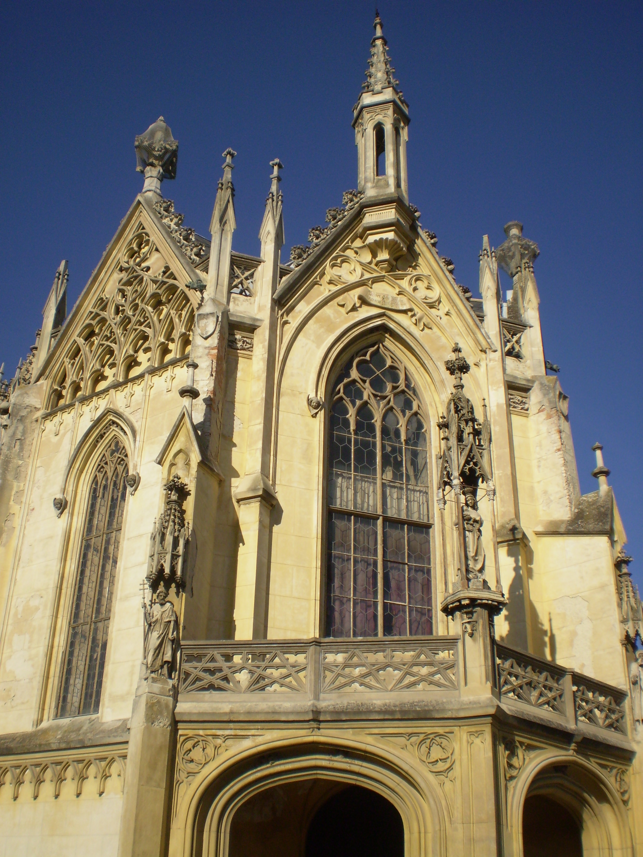 Zámek Lednice.